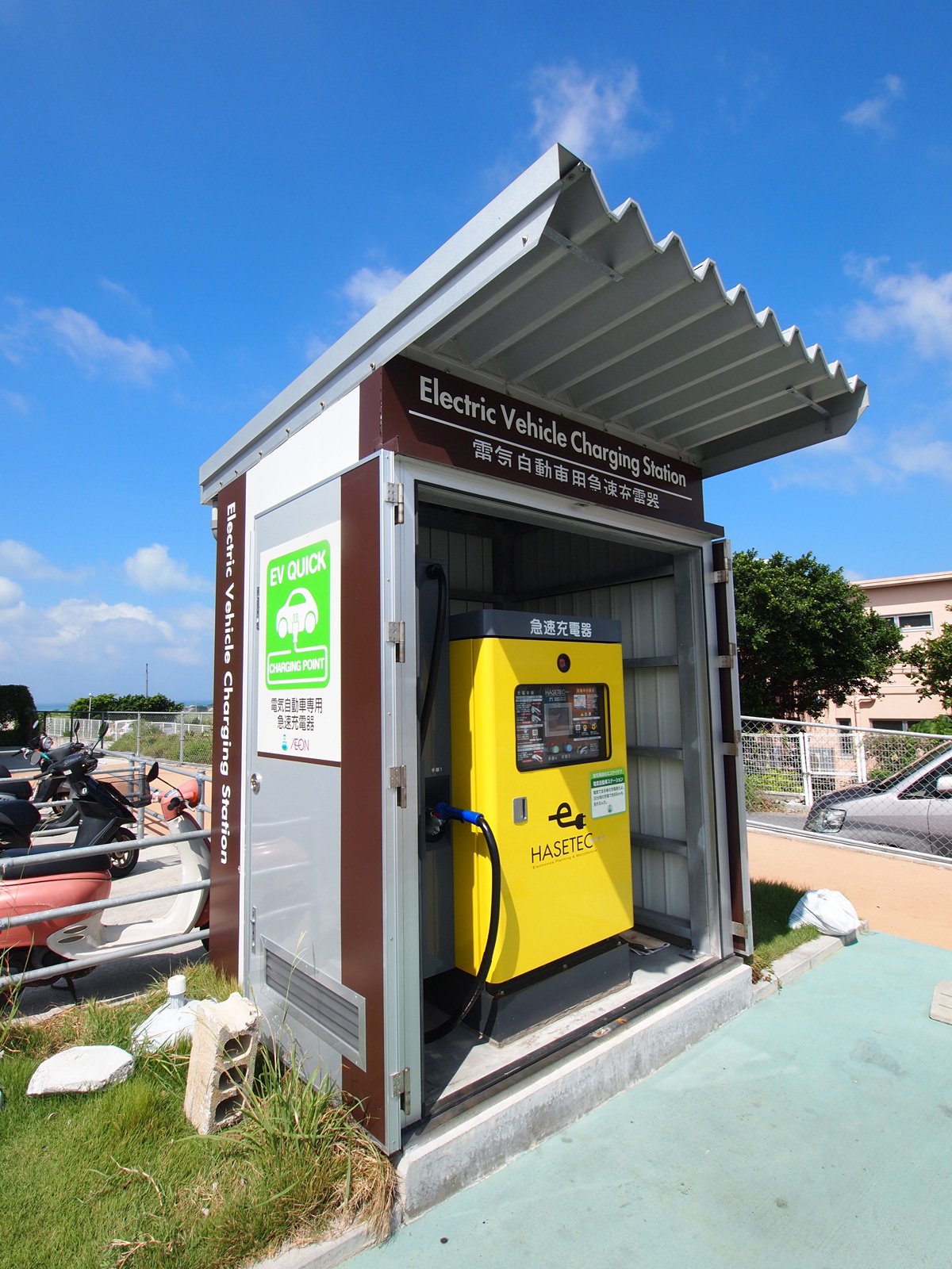 電気自動車充電施設（イオンタウン宮古南ショッピングセンター）